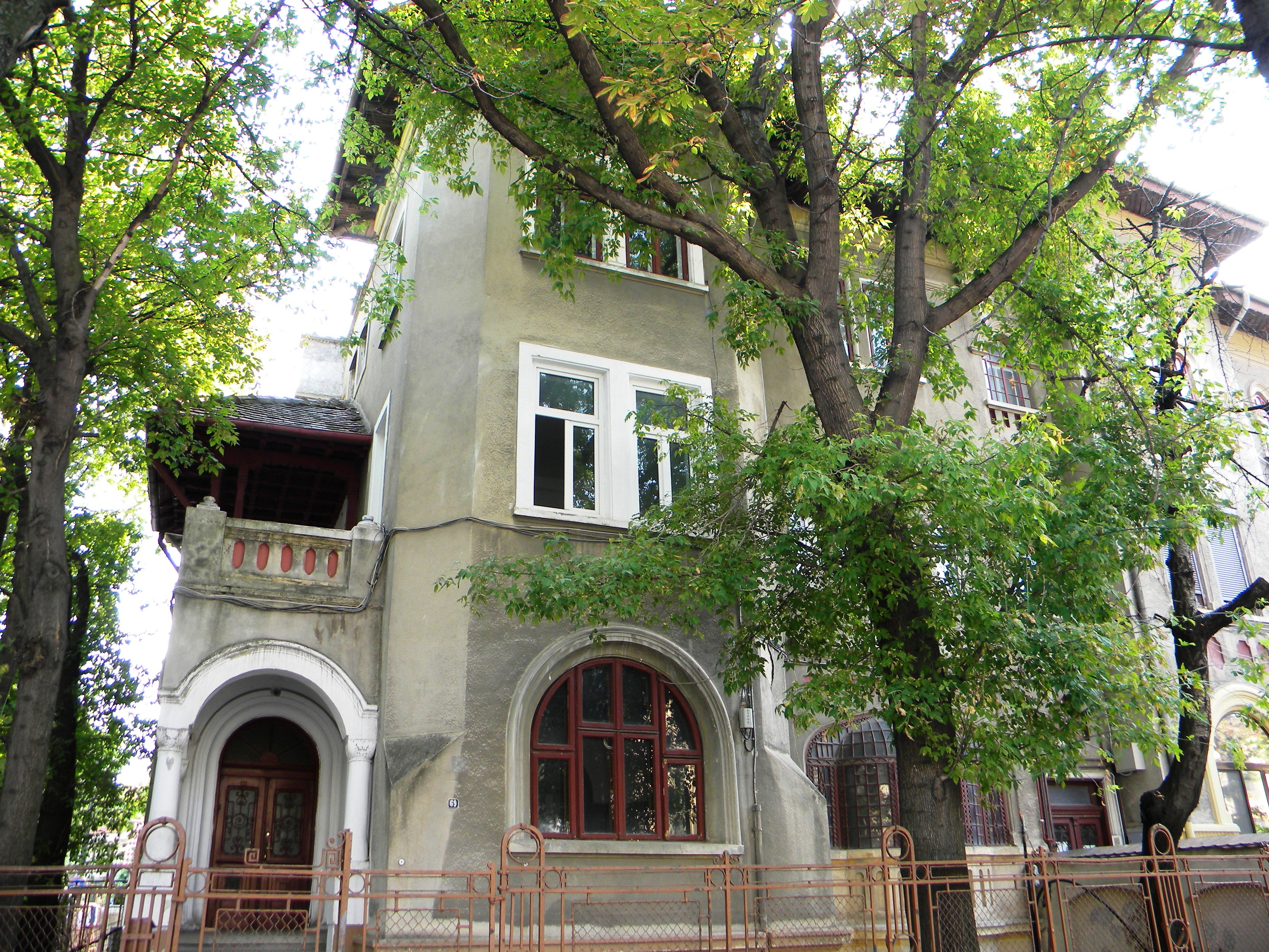 Casa nr. 69 pe Bd. Eroii Sanitari, Bucuresti sect. 5